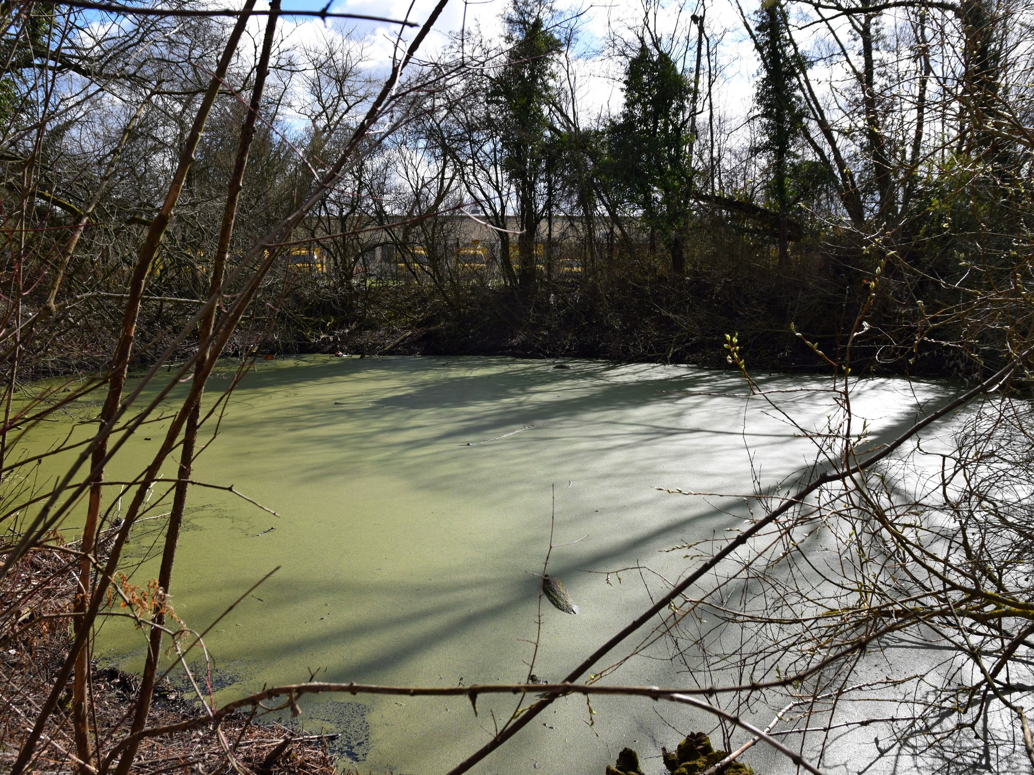 Teich an der Markendorfer Straße in Frankfurt (Oder)